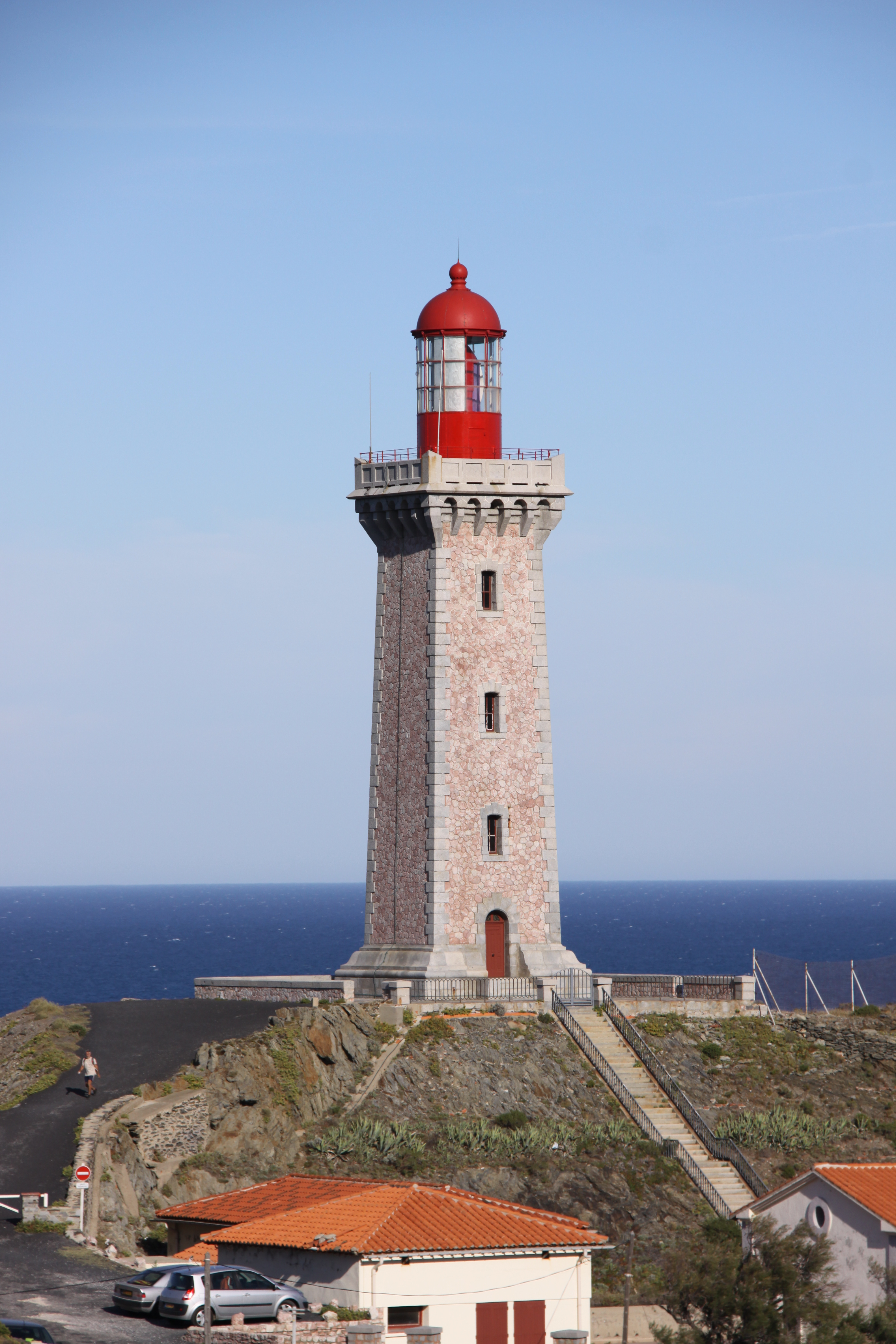 Le phare de Béar est situé au Cap Béar (Cap de Biarra en catalan) entre Port-Vendres et Banyuls-sur-Mer. Il mesure 27 mètres de haut et domine au dessus de la mer de 79,67 mètres. Il a une portée lumineuse de 30 milles marins. Cap Béar (près de Port-Vendres), Pyrénées-Orientales, France.